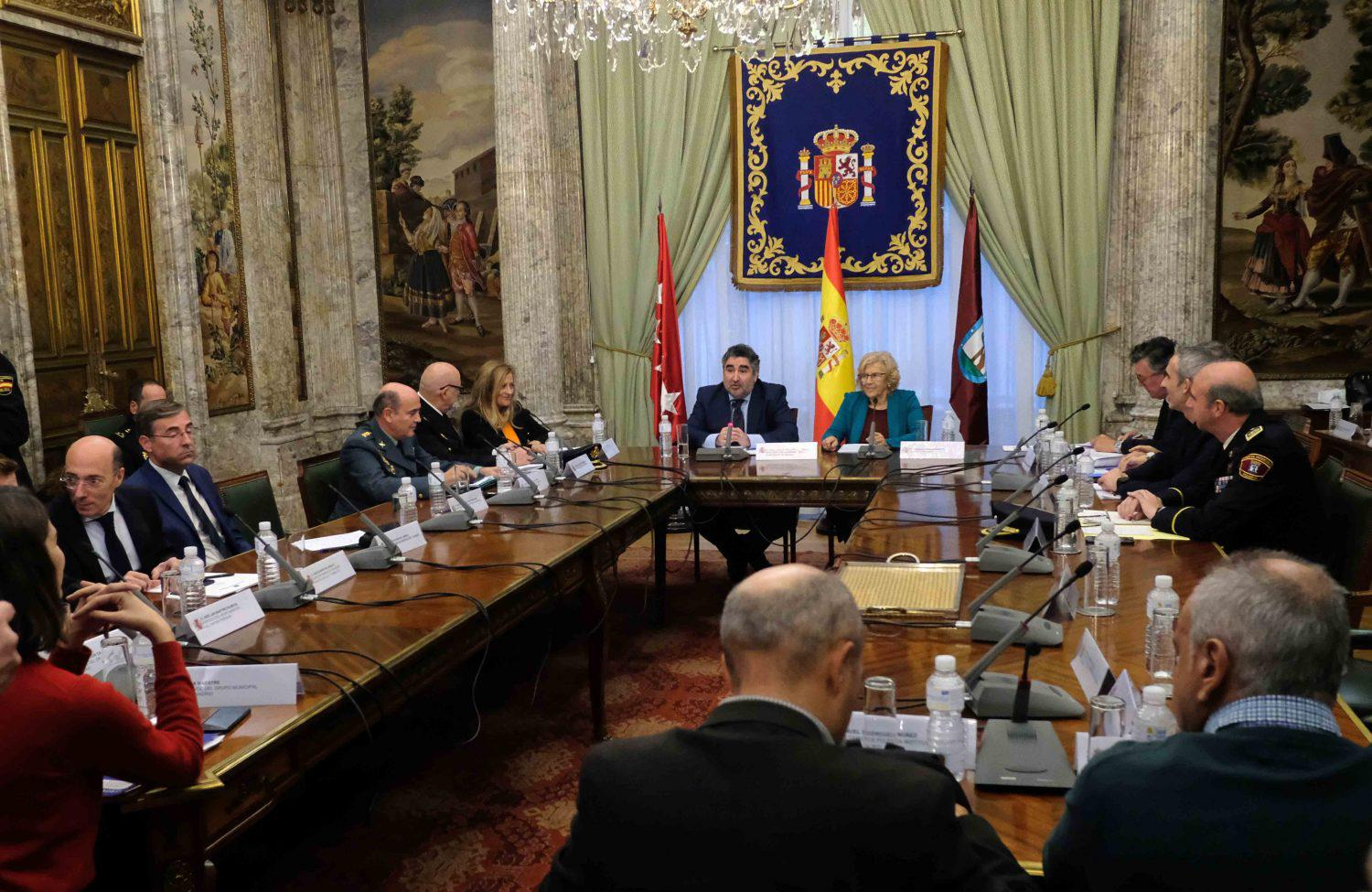 La alcaldesa de Madrid, Manuela Carmena; el delegado del Gobierno en Madrid, José Manuel Rodríguez Uribes; el delegado del Área de Salud, Seguridad y Emergencias, Javier Barbero; diversos mandos de Policía Municipal y del Cuerpo Nacional de Policía (CNP), así como otras autoridades y representantes vecinales y de comerciantes, han compartido durante la mañana de hoy los datos de seguridad de la ciudad de Madrid del primer semestre de 2018, haciendo la comparativa con el mismo periodo de 2017.